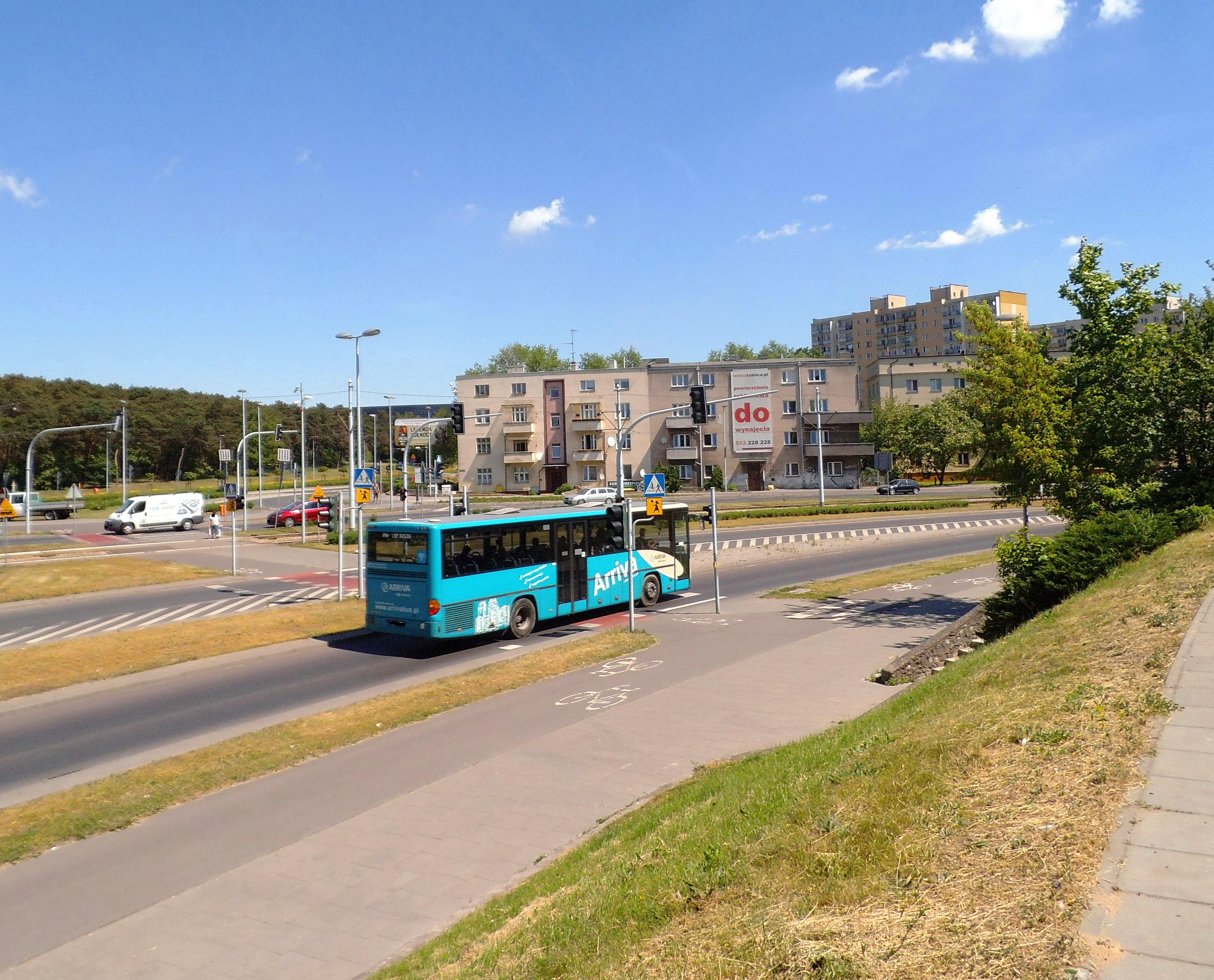 Plac prof. A. Hoffmanna w Toruniu1